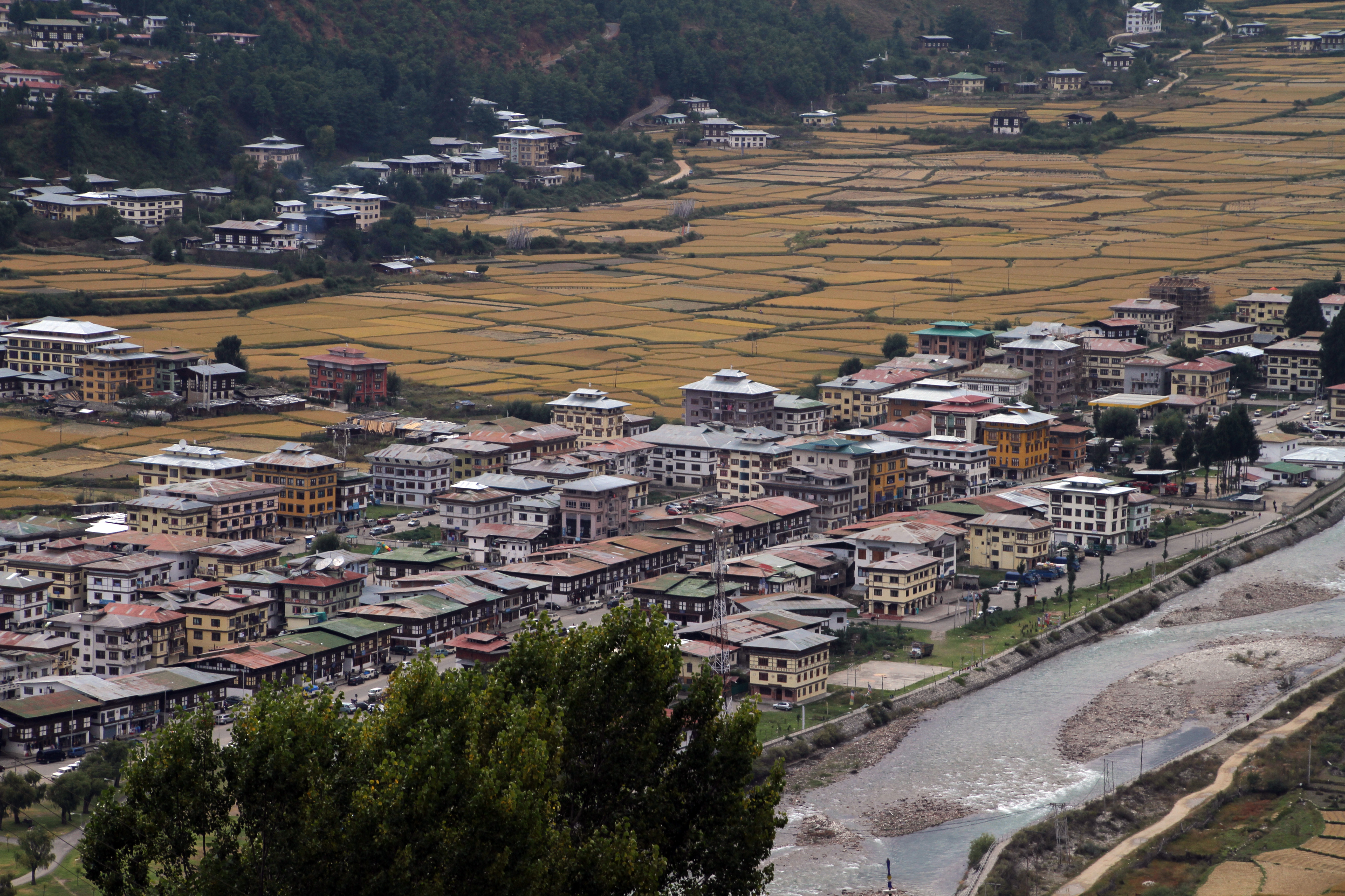 Paro in Bhutan